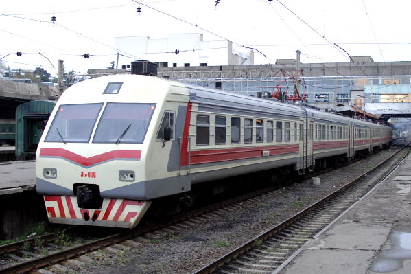 ეს-006 in Tbilissi.